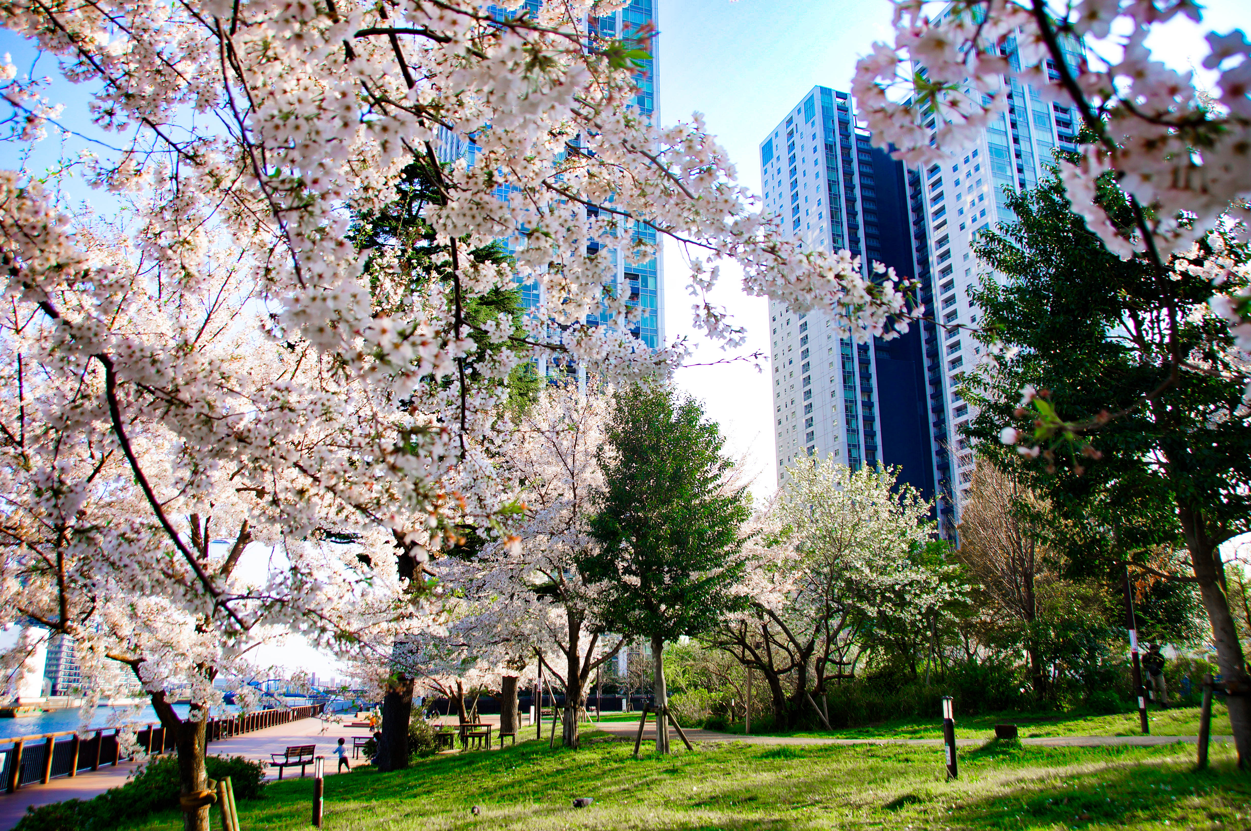 春の港南緑水公園